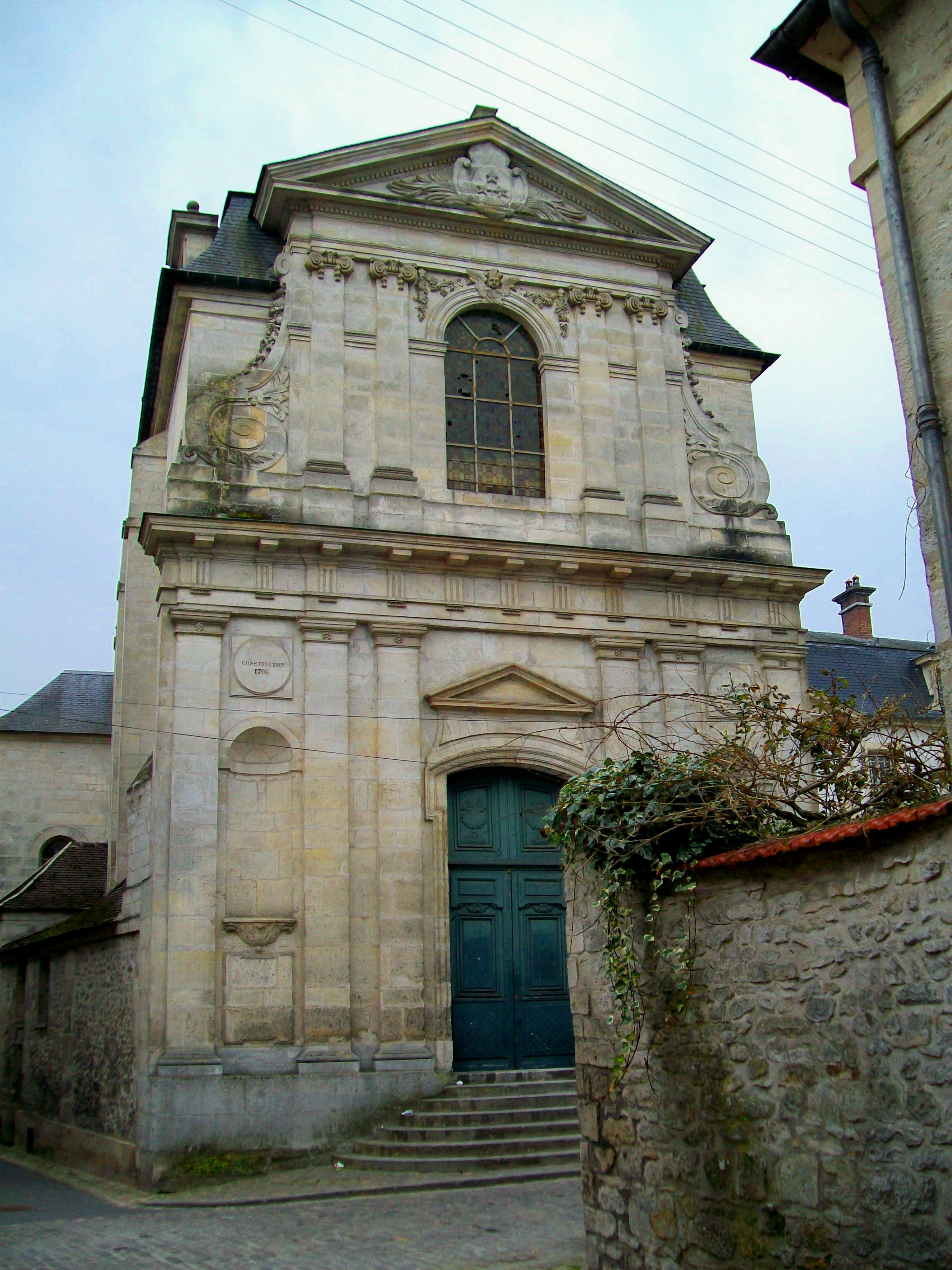 Chapelle de l'ancien hôpital de la Charité de 1706, façade nord : la chapelle n'est pas orientée est-ouest comme le sent d'habitude toutes les églises. Elle a hébergé le musée municipal de 1887 à 1956, devenu musée de la Vénerie en 1935.